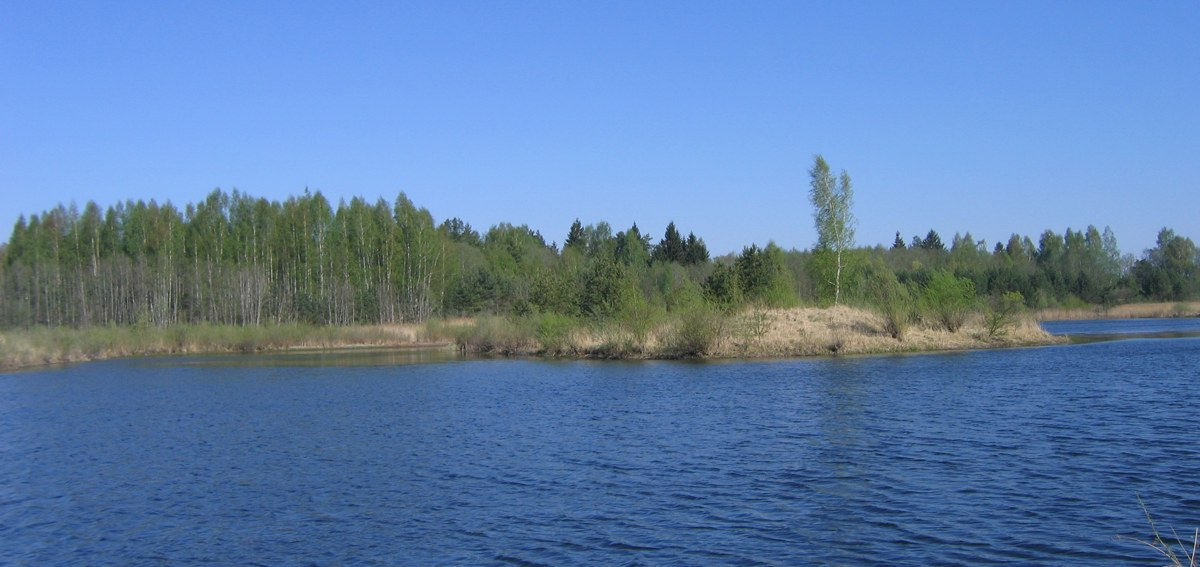 Autoriaus nuotrauka, 2006.05.08. Sala vandens telkinyje (karjeruose) prie Šaukliškių. Nuotrauka gali būti platinama pagal GFDL licenciją.